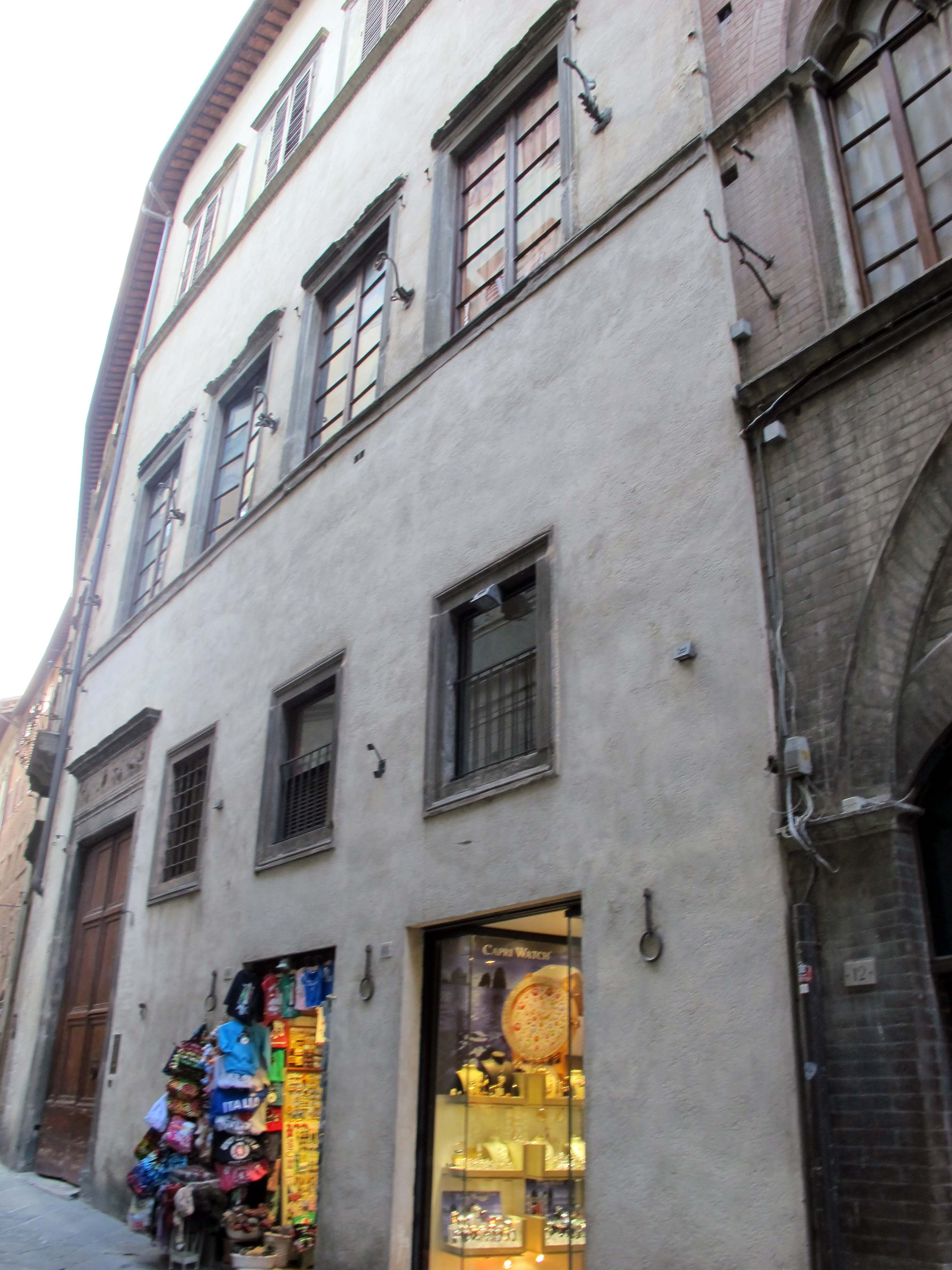 Via dei Pellegrini e dintorni, Siena